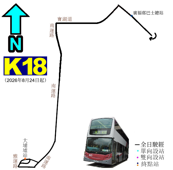 中文（香港）: 港鐵接駁巴士K18線的走線圖